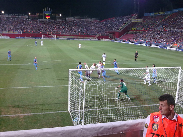 Hüseyin Avni Aker Stadyumu